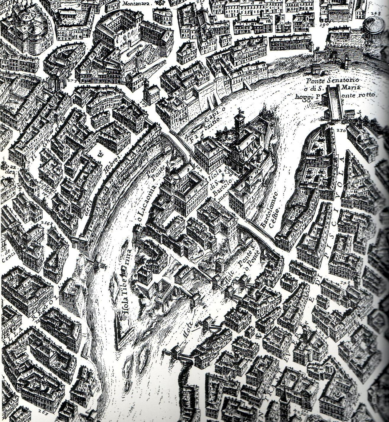 Giovanni Battista Falda, Isola Tiberina, Ghetto, Piscinula, particolare da "Nvova pianta et alzata della città di Roma con tvtte le strade, piazze et edificii de tempi, palazzi, giardini et altre fabbriche antiche e moderne come si trovano al presente nel pontificato di N.S. Papa Innocentio XI con le loro dichiarationi nomi et indice copiosissimo" (eseguito 1676, pubblicato da G.G. de Rossi nel 1730)